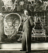 Karel Štika (1898-1975), český malíř a grafik